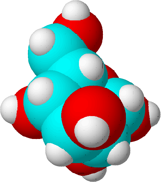 glucose molecule